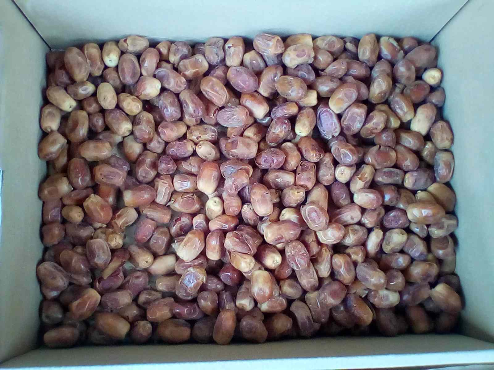 خرما شکری (Shukari) این نوع خرما کلسترول را پایین می‌آورد، از پوسیدگی دندان جلوگیری می‌کند و همچنین کمک‌تان می‌کند که از شر خستگی رها شوید. خرمای شکری در منطقه‌ی قصیم عربستان و نواحی جنوبی ایران کشت می­شود.